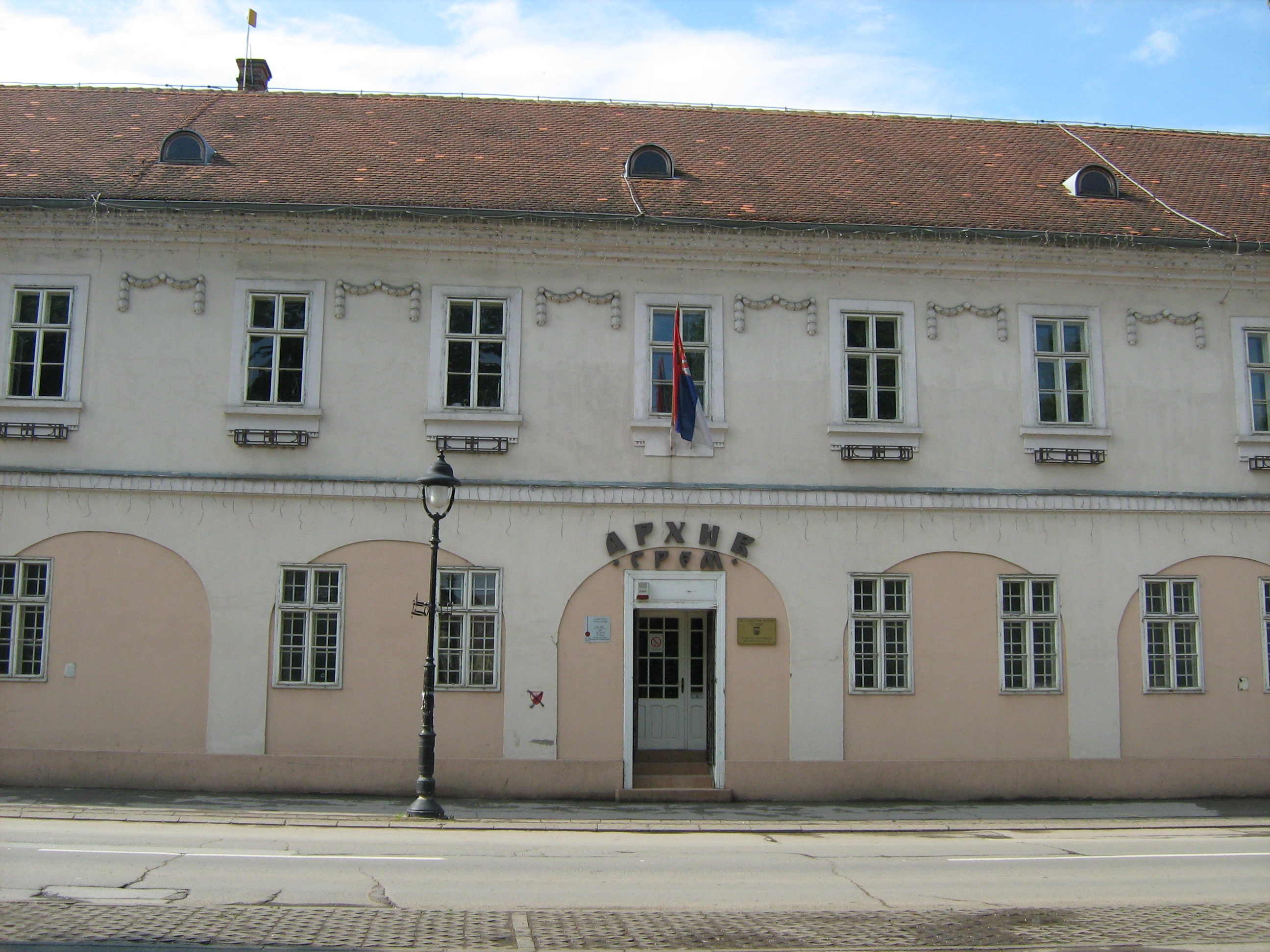 Зграда некадашње Главне страже, данас Историјски архив Срема